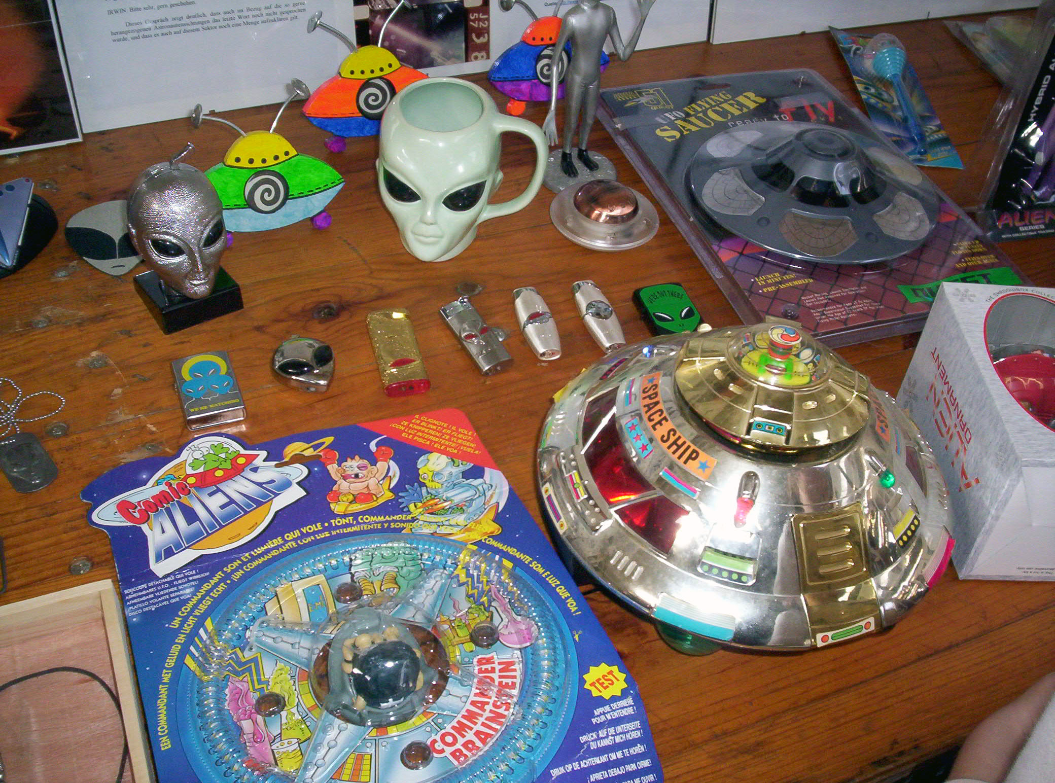 Europeen UFO Congress 2005, Châlons en Champagne, France. Les premières rencontres ufologiques, Châlons en Champagne, France, les 14, 15 et 16 octobre 2005. Détails d'un stand. Taken on october 16, 2005.